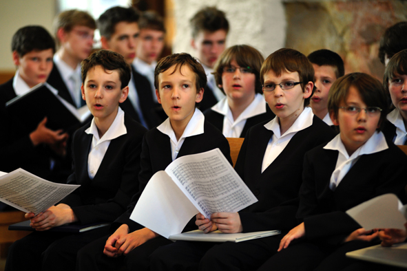 Dresdner Kreuzchor, Vesperprobe in der Kreuzkirche, Juni 2012